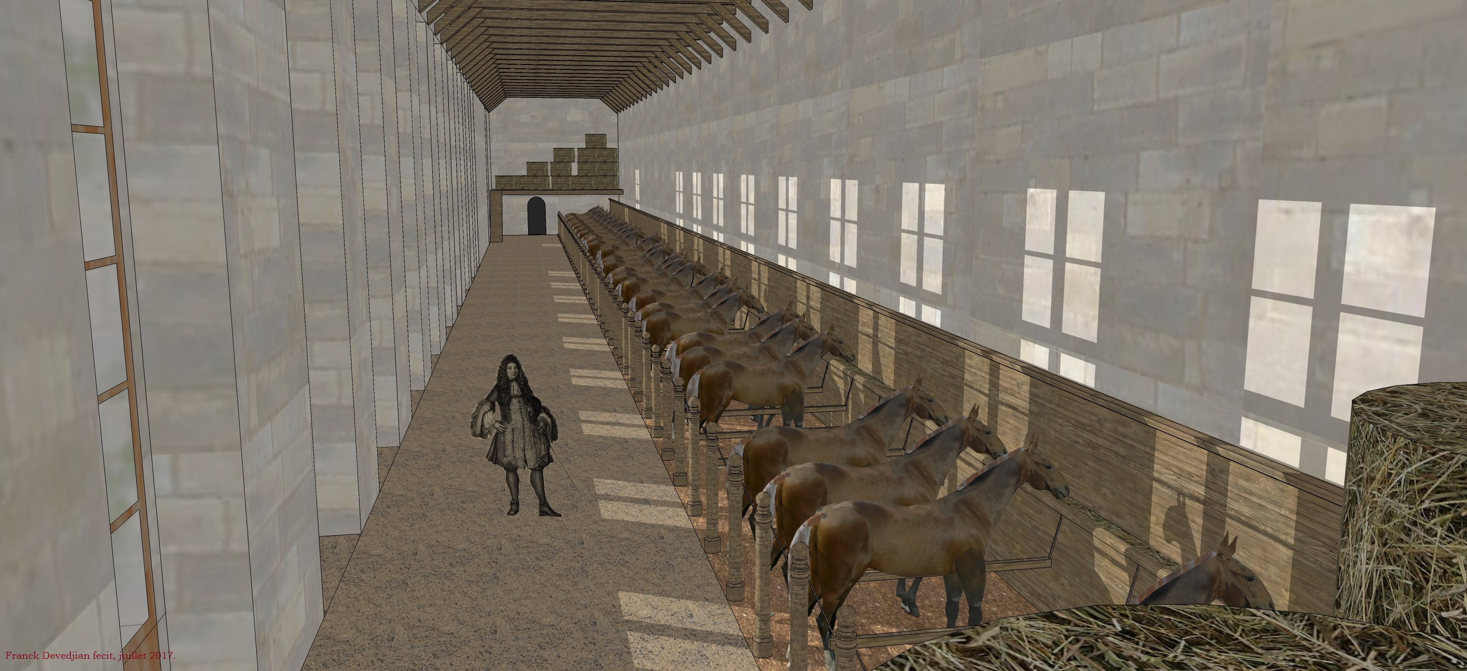 Restitution de l'écurie de la Cour des Offices du château de Meudon au temps de Louvois, vers 1685.